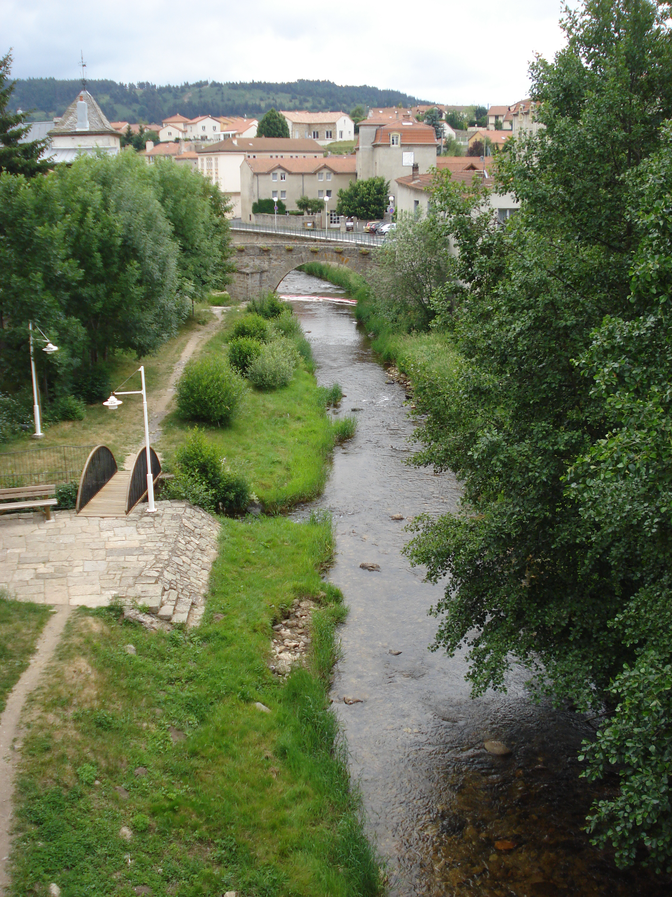 Langogne (Lozère, Fr), rivière le Langouyrou ou Langoirón.